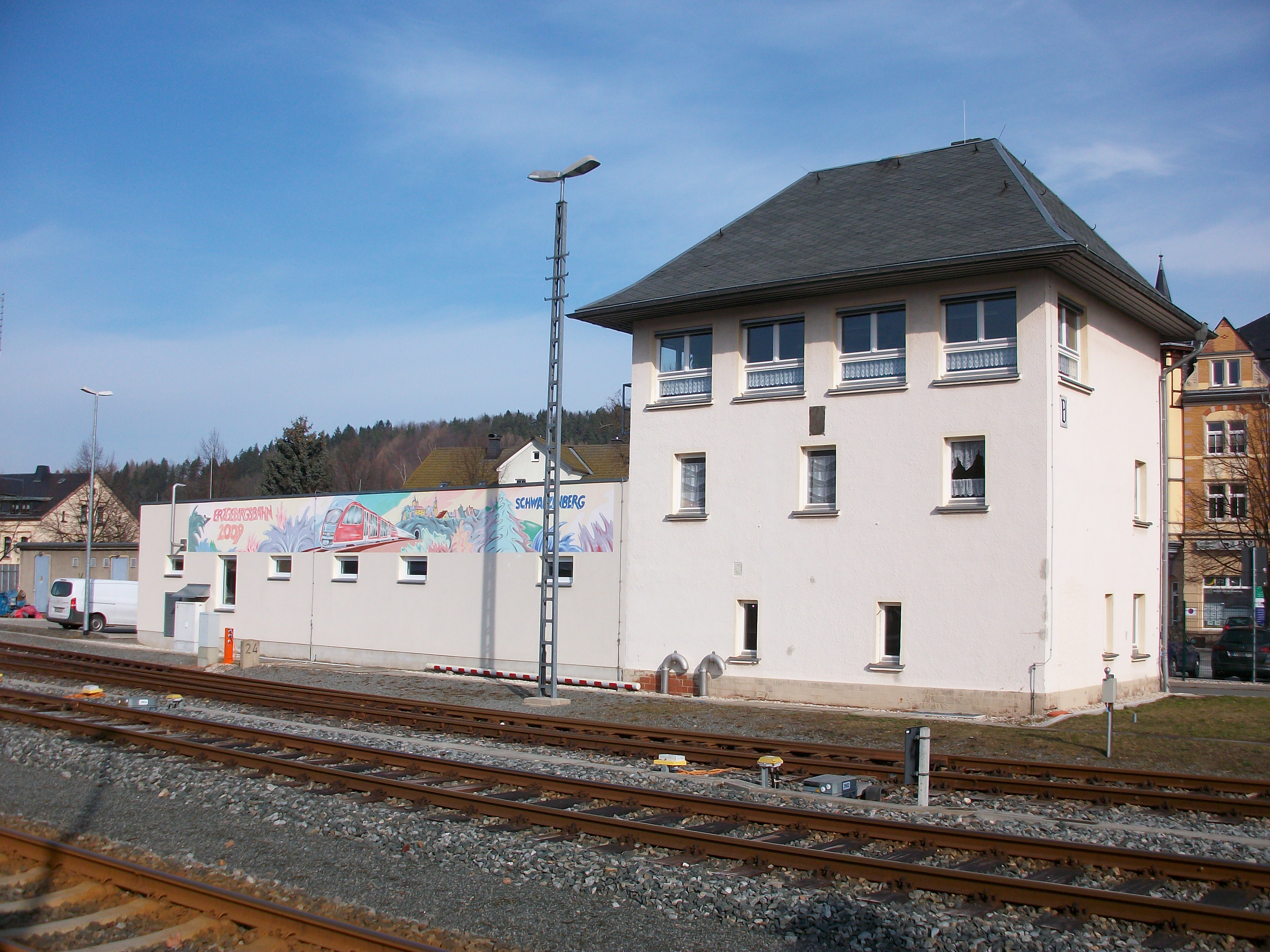 Bahnhof Schwarzenberg Stellwerk